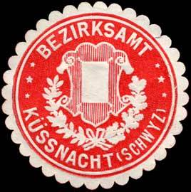 Sealing stamp Title: Bezirksamt - Küssnacht (Schwyz) Description: rot, weiß, geprägt Place: Küssnacht / Schweiz size: 4 cm